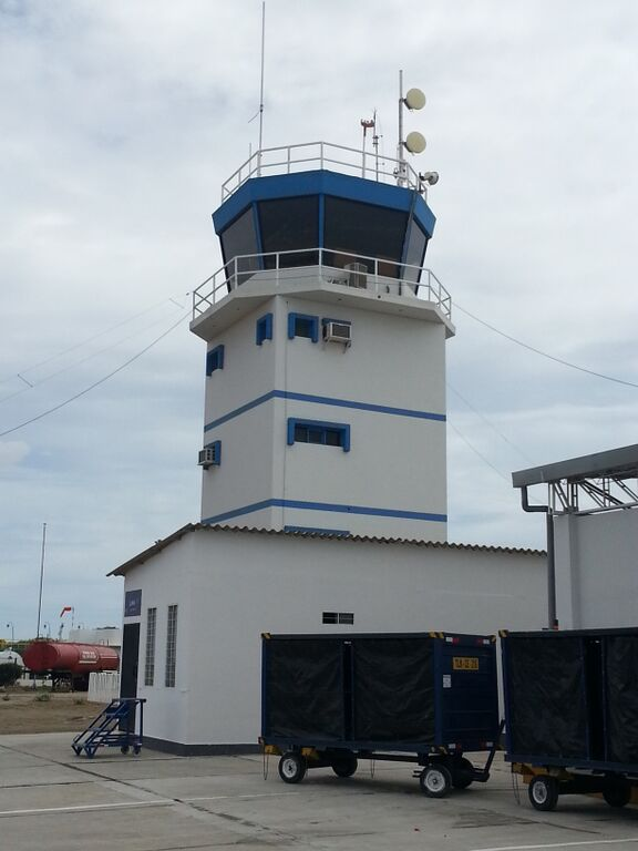 Torre Talara 2015